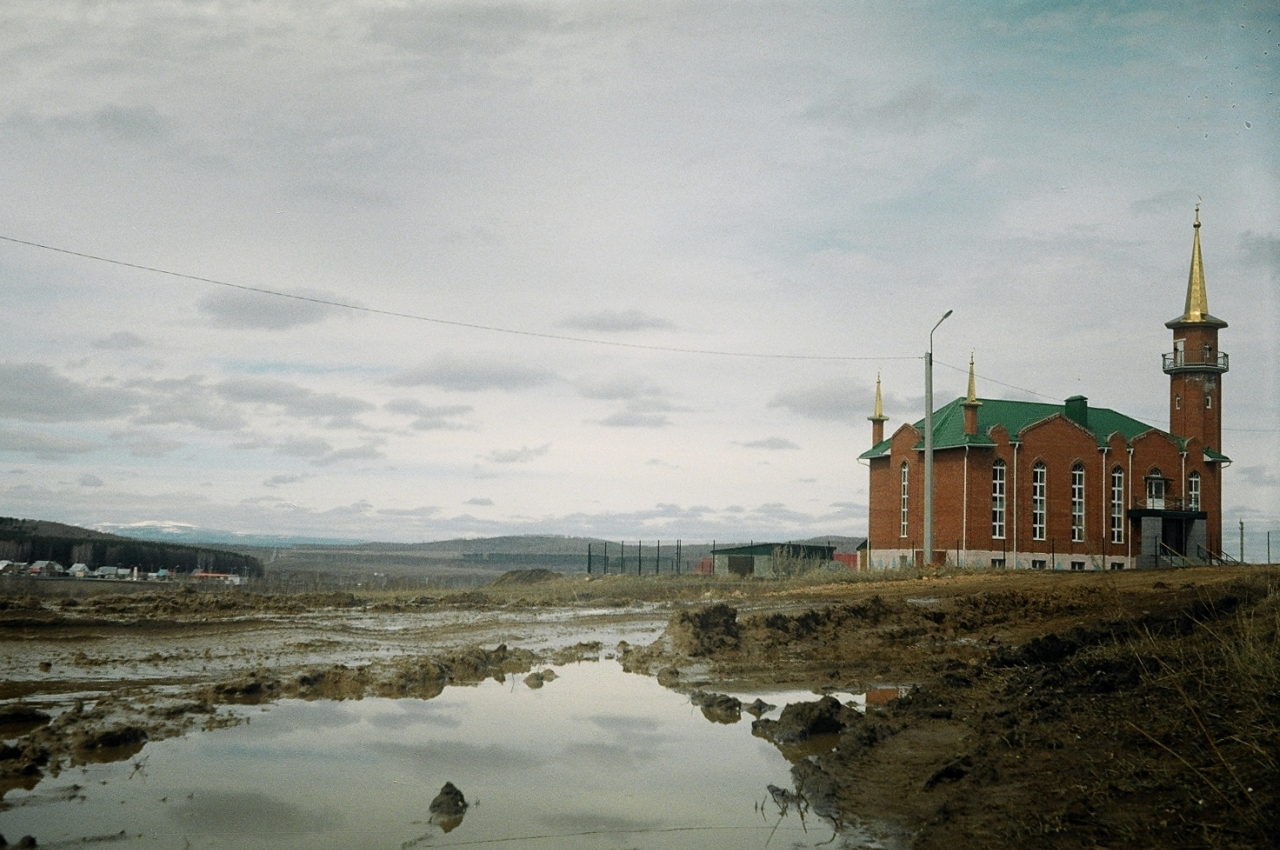 Мечеть имени Зайнуллы Ишана в Учалах